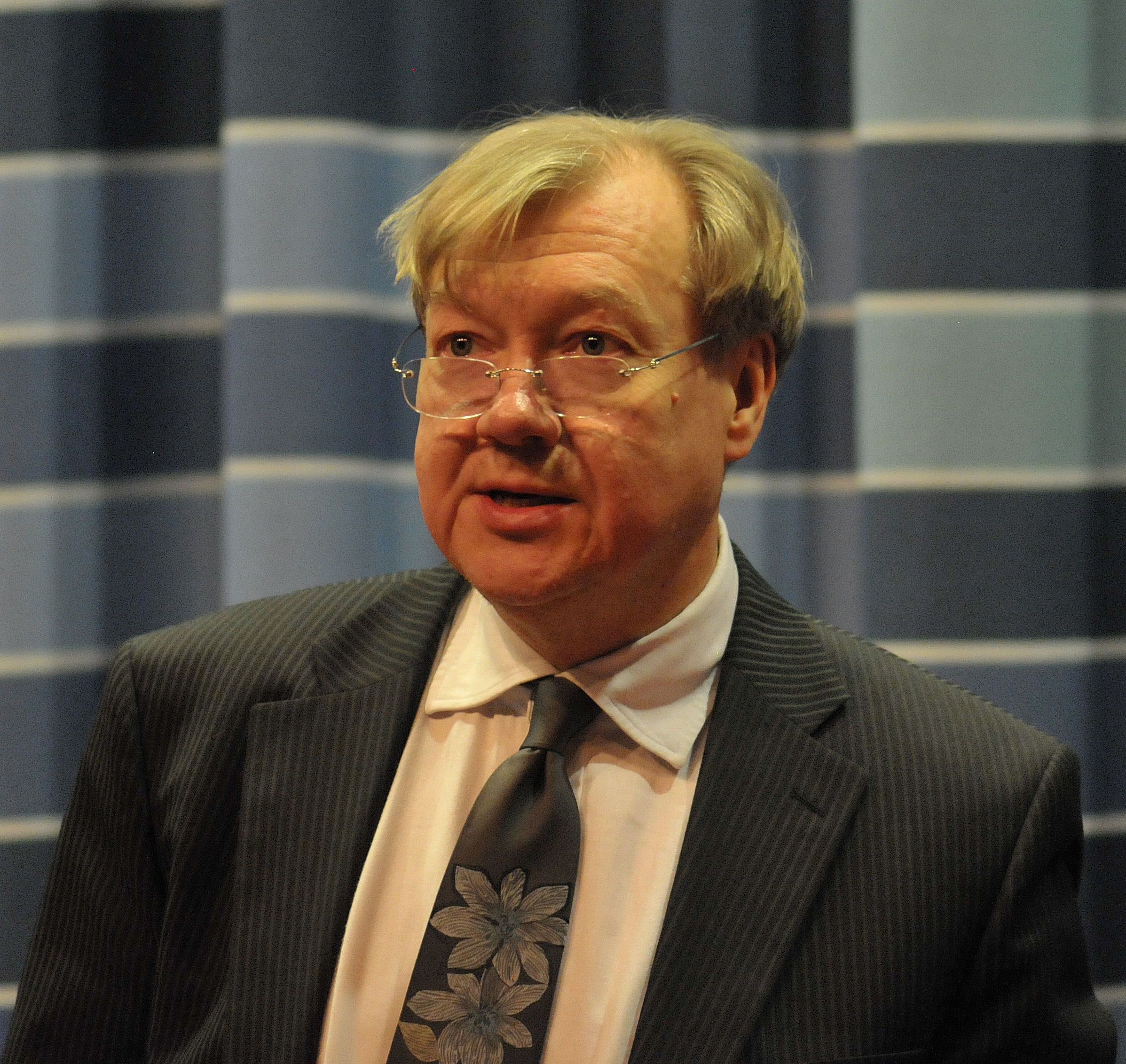 Tapani Länsiö, suomalainen säveltäjä, lehtori ja kuoronjohtaja